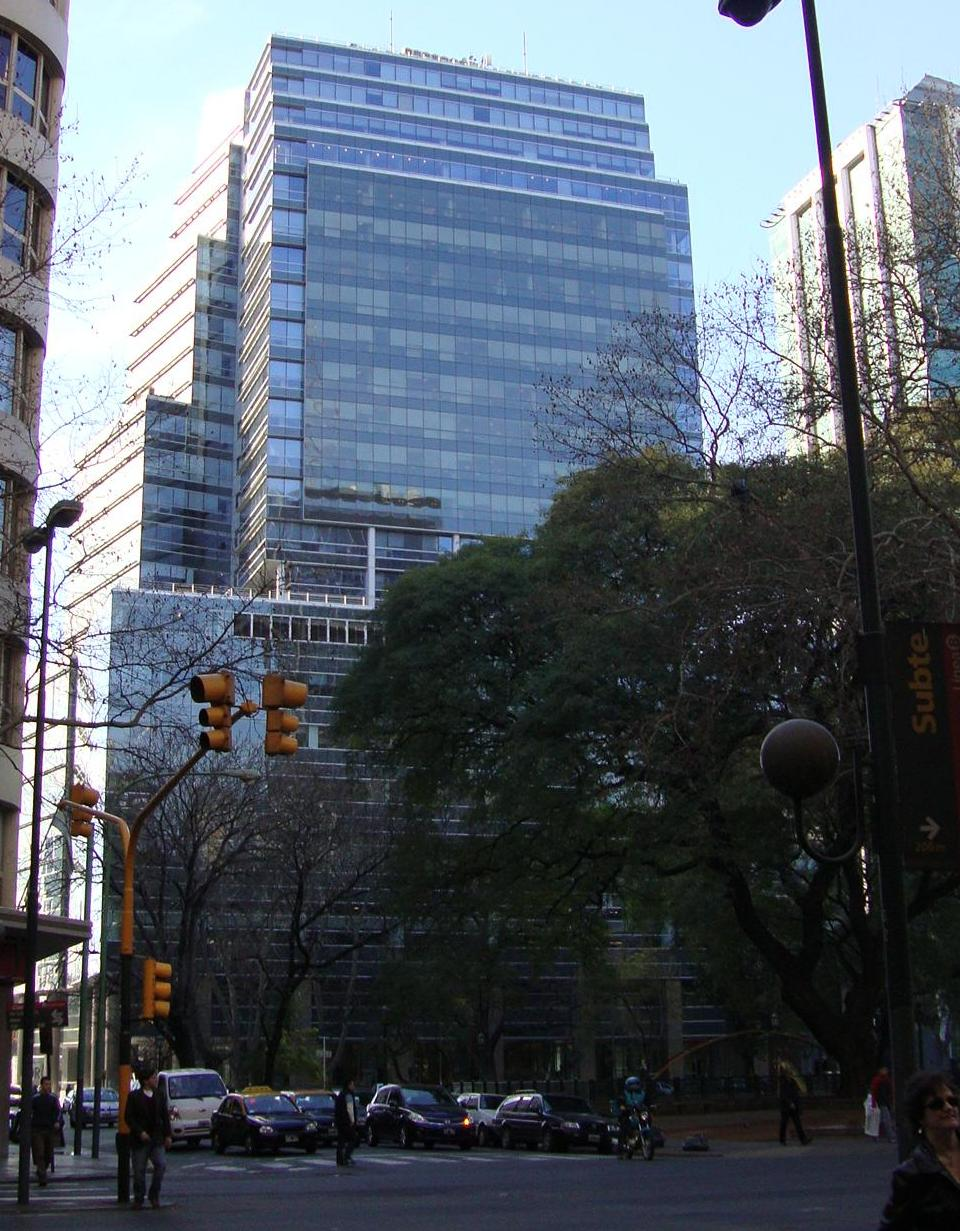 La Torre Bouchard Plaza, también conocida como Edificio La Nación, vista desde la Avenida Leandro N. Alem, en Buenos Aires, Argentina